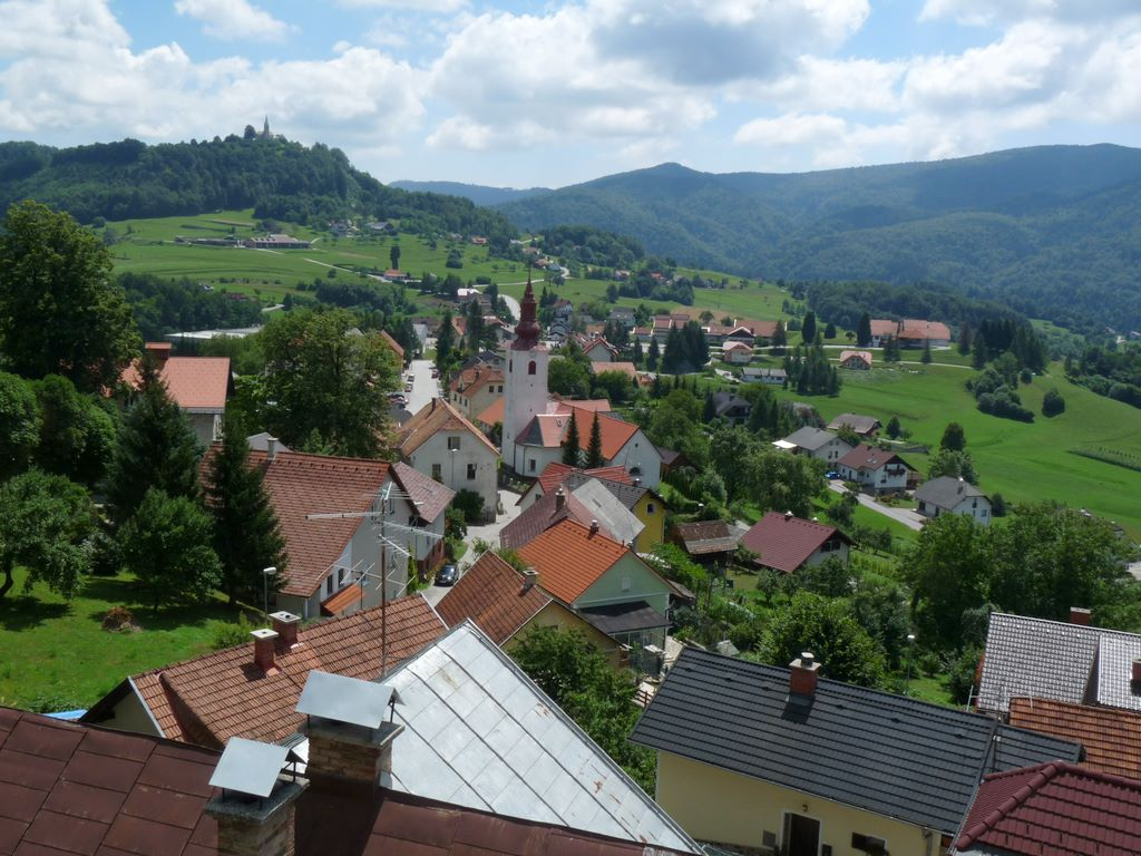 Planina pri Sevnici